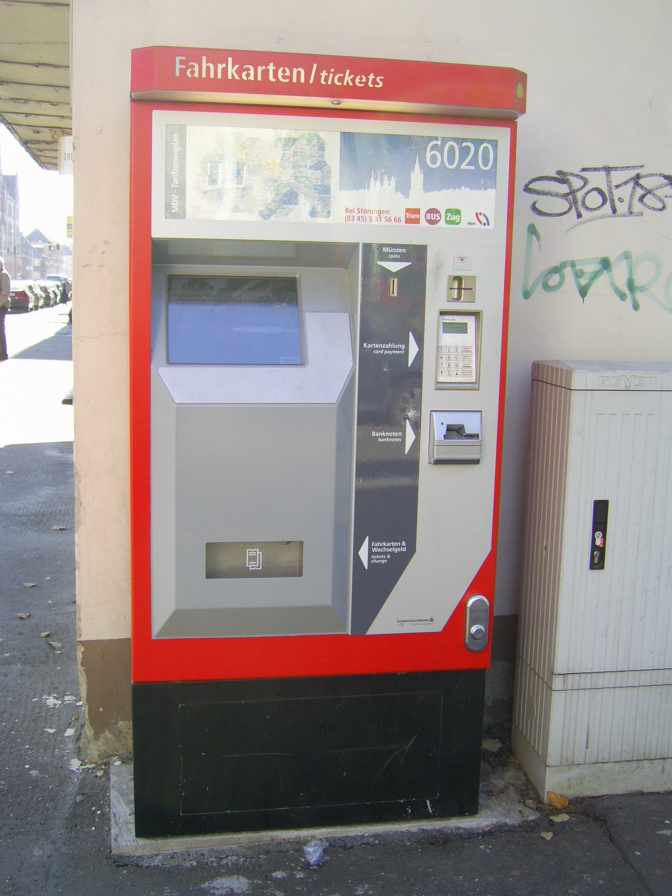 Fahrscheinautomat der HAVAG an der Haltestelle Freiimfelder Strasse